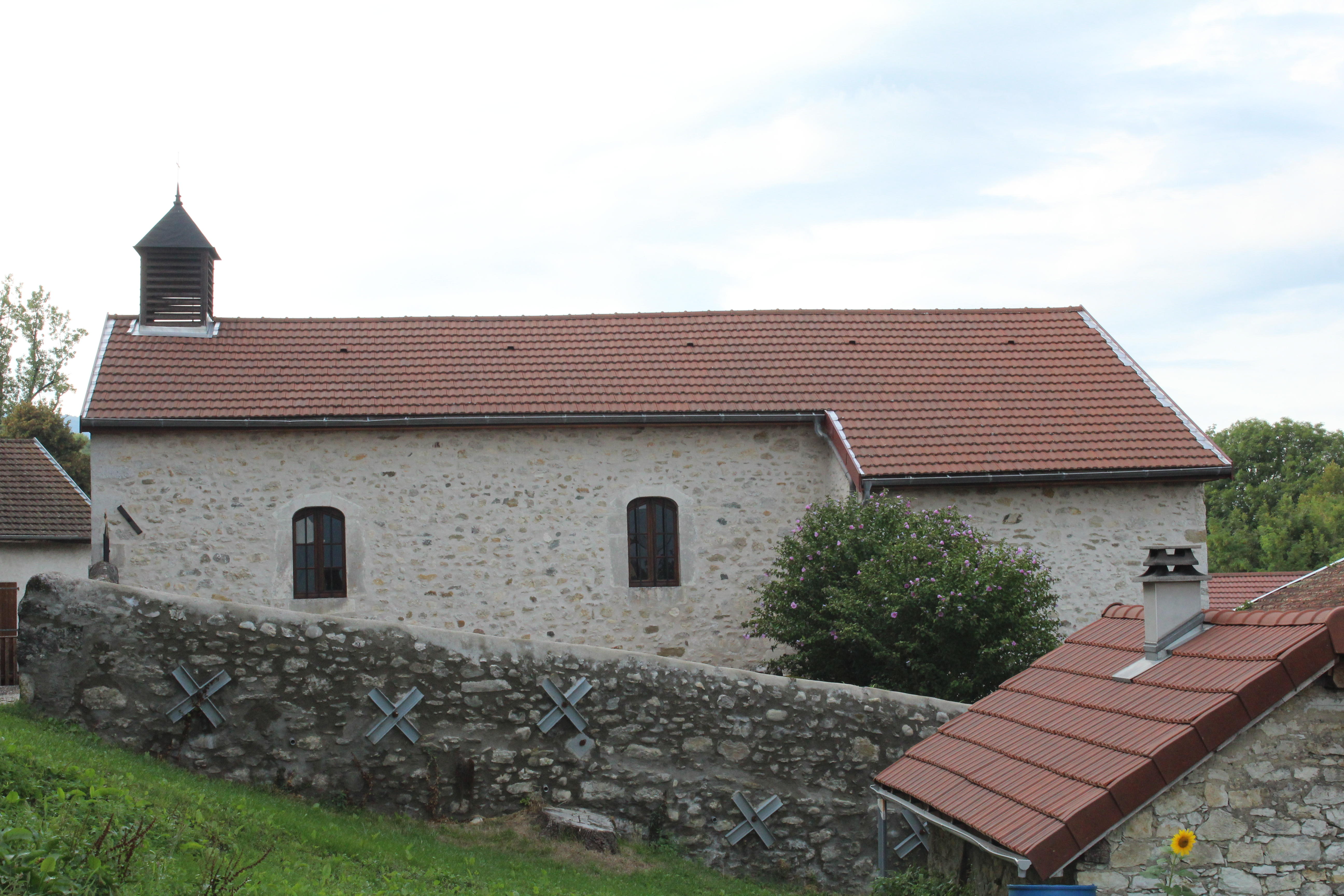 Église Saint-Pierre de Surjoux.